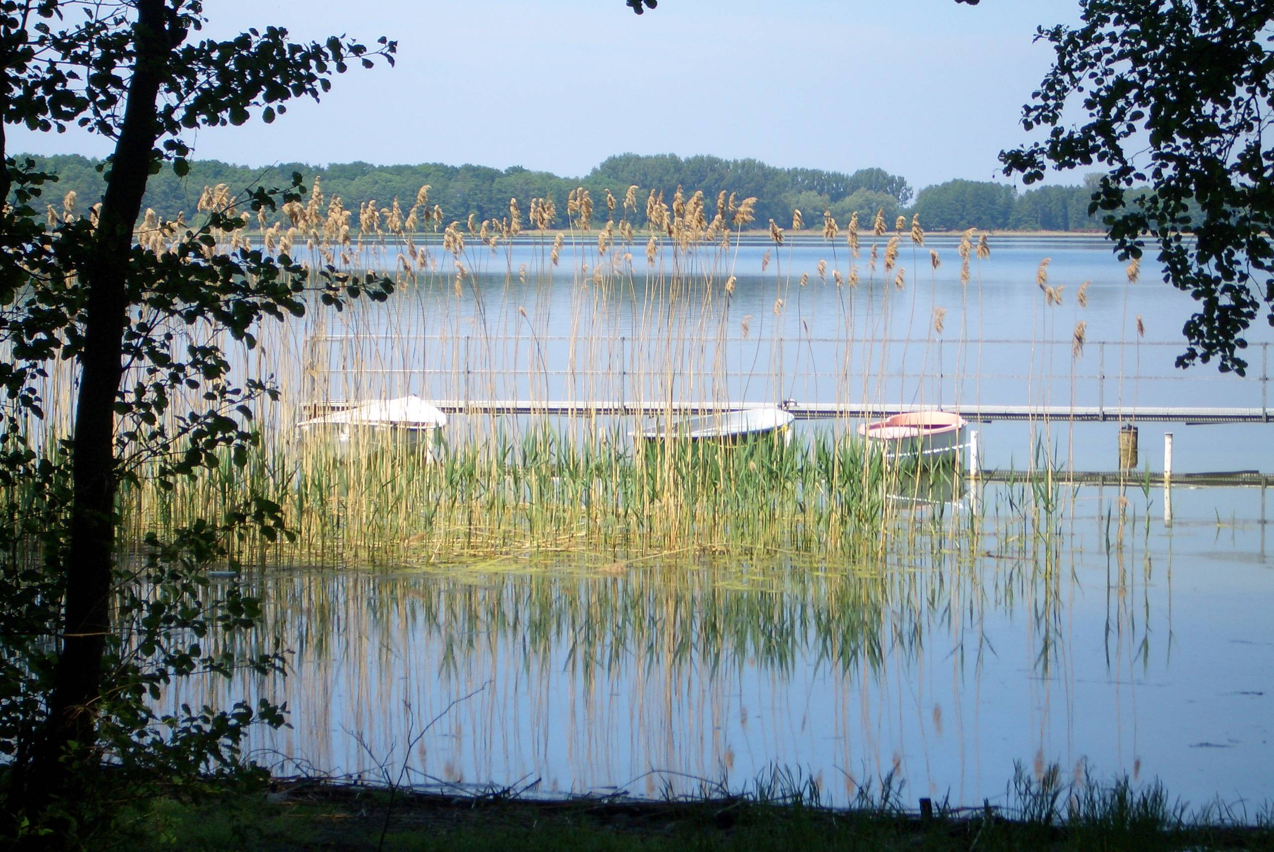 Der Arendsee im Altmarkkreis Salzwedel; ein Einbruchsee mit großer Tiefe. Blick vom Ufer durchs Ufergehölz auf die Seefläche.